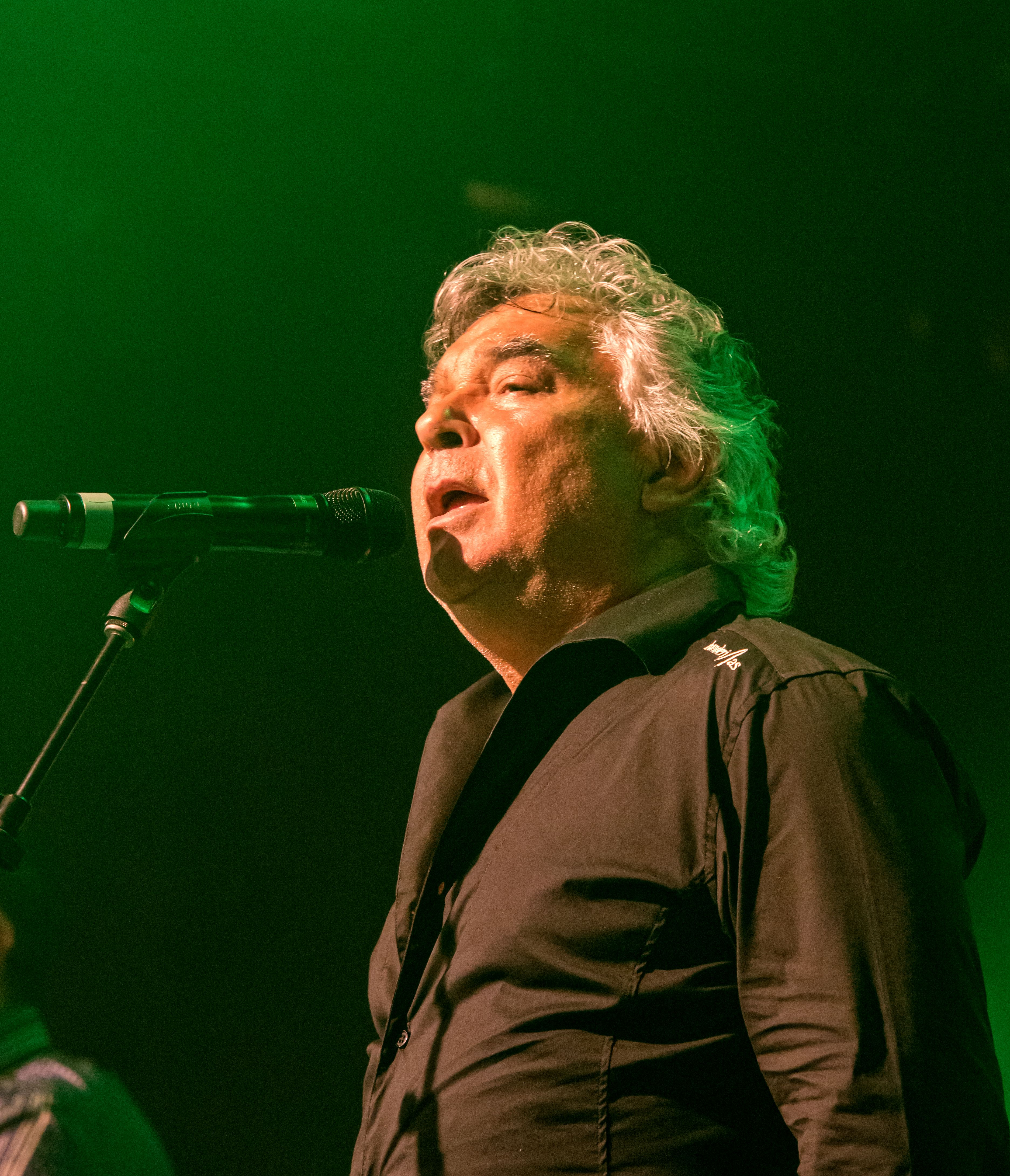 Bilder vom Zelt Musik Festival 2016 in Freiburg im Breisgau Gipsy Kings